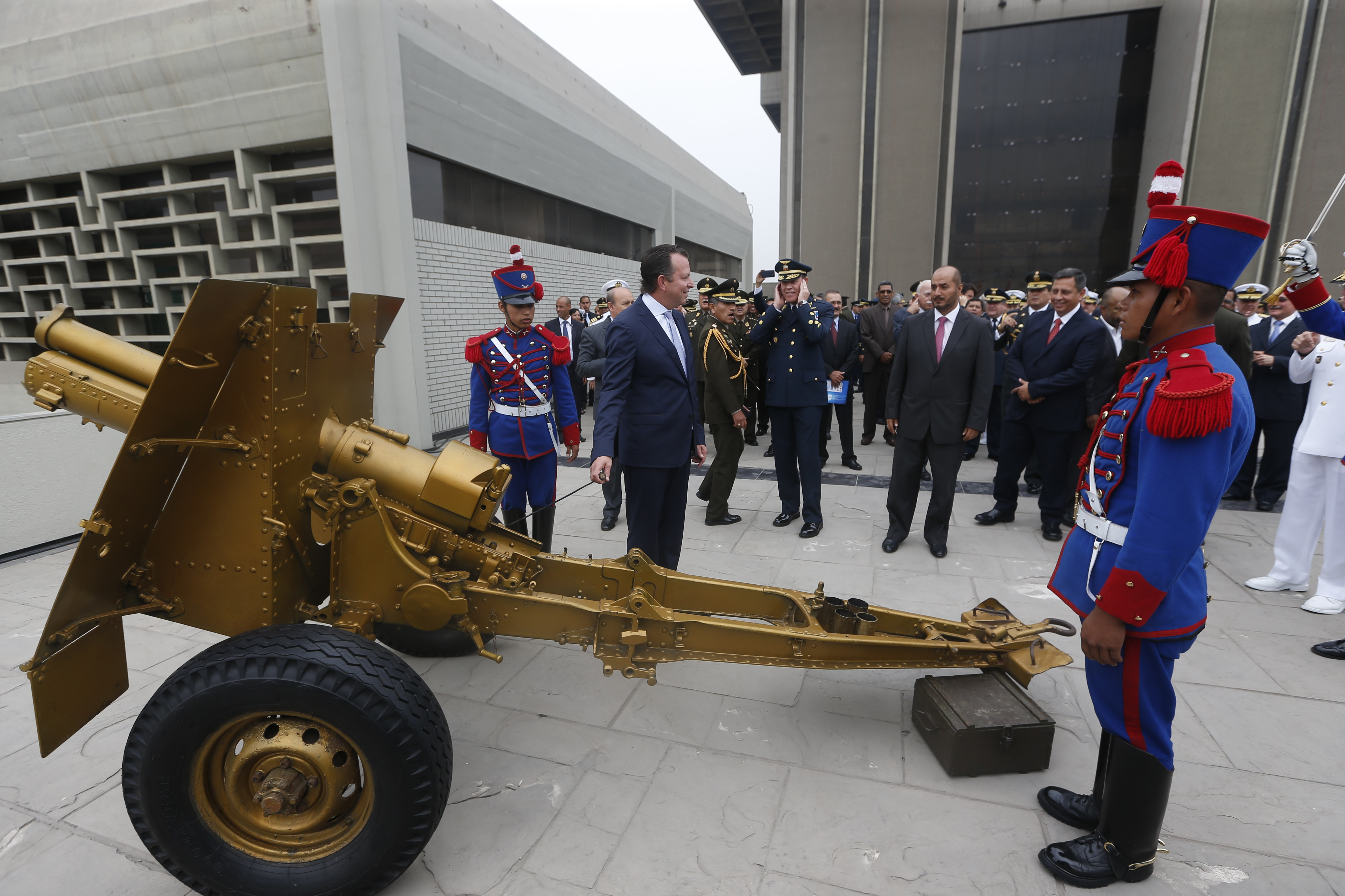 El ministro de Defensa Jakke Valakivi inauguró el V Salón Internacional de Tecnología para la Defensa y Prevención de Desastres Naturales, SITDEF 2015, evento que congrega a expertos y empresas de diversos países para el intercambio de información y tecnologías sobre defensa y seguridad. El titular del sector estuvo acompañado de su par del Interior, José Luis Pérez Guadalupe, del viceministro de Políticas para la Defensa, Iván Vega, y de los comandantes generales de la Marina, Almirante Edmundo Deville; de la fuerza Aérea, General del Aire Dante Arévalo, y del Ejército, General Ronald Hurtado, este último presidente del comité organizador del evento. “El progreso y modernización de nuestras Fuerzas Armadas es una constante en el gobierno y, en este contexto, la tecnología ocupa un eje central. El evento que hoy presentamos es un ejemplo de cómo nuestro sector y nuestros Institutos Armados pueden generar alianzas para promover la participación empresarial y el acercamiento a nuevas tecnologías, en beneficio de la industria de la defensa”, señaló el ministro. A continuación, recorrió los ambientes del SITDEF en el Cuartel General del Ejército, donde destacan stands de los Servicios Industriales de la Marina (SIMA), del Servicio de Mantenimiento de la FAP (SEMAN) y de la empresa coreana KAI, que participa en el proceso de coproducción de aviones KT-1P. En un área de exhibición de 18 mil metros cuadrados, participan más de cien empresas de 26 países líderes en tecnología de la defensa, como Rusia, Estados Unidos, Francia, Canadá, España, Alemania y China. El evento culminará el domingo 17. Se desarrollarán demostraciones tácticas de Fuerzas Especiales, y se podrán apreciar unidades especializadas, vehículos, artillería, Sistema de Defensa Antiaérea, y equipos de rescate y salvamento, entre otros. 14 de mayo del 2015